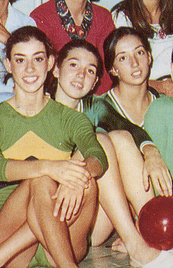 Cathy Xaudaró con la selección nacional de gimnasia rítmica en 1975.